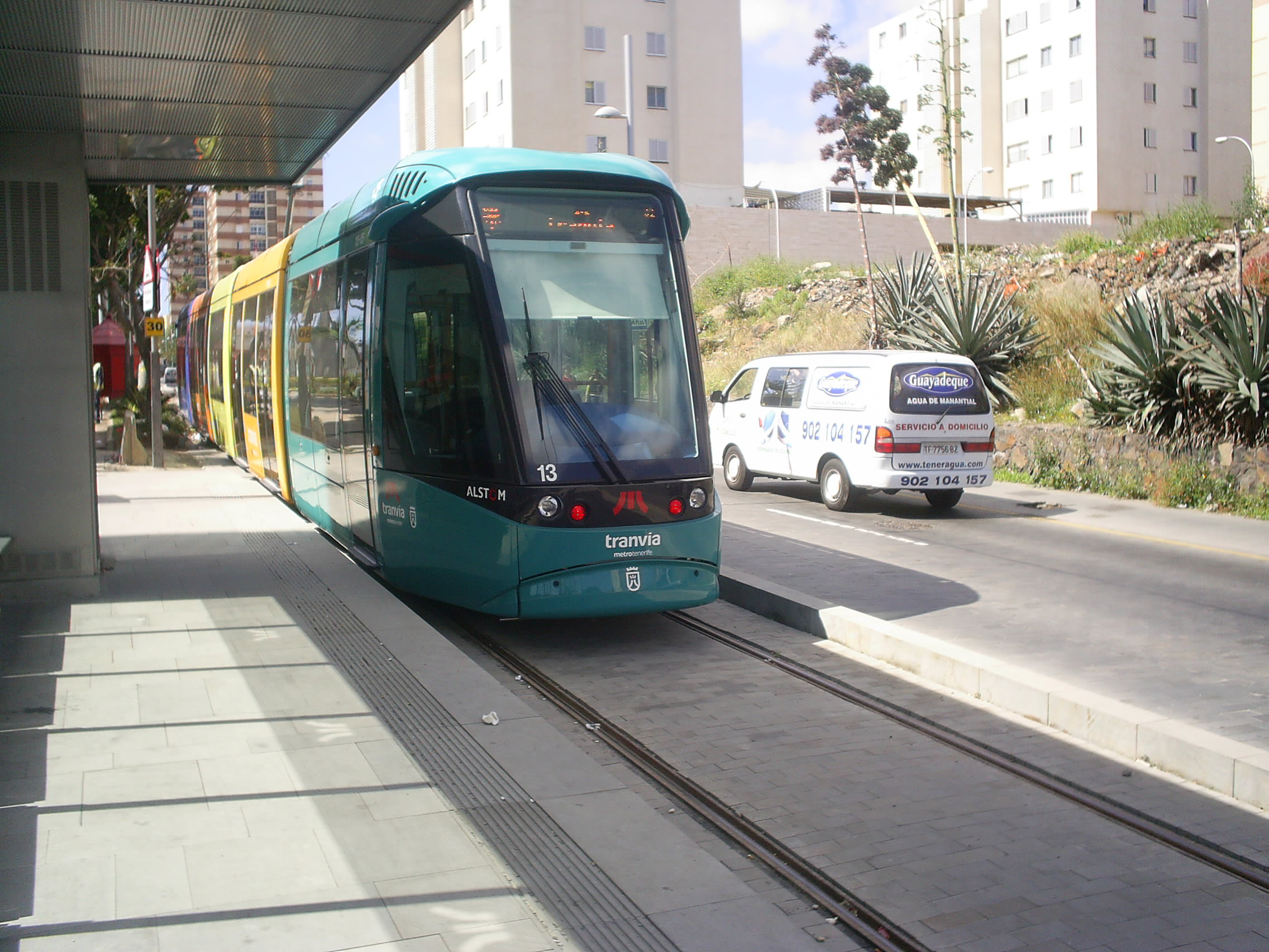 Este es un vehículo del tranvía de Tenerife saliendo de la parada Príncipes de España (Ofra, Santa Cruz de Tenerife)